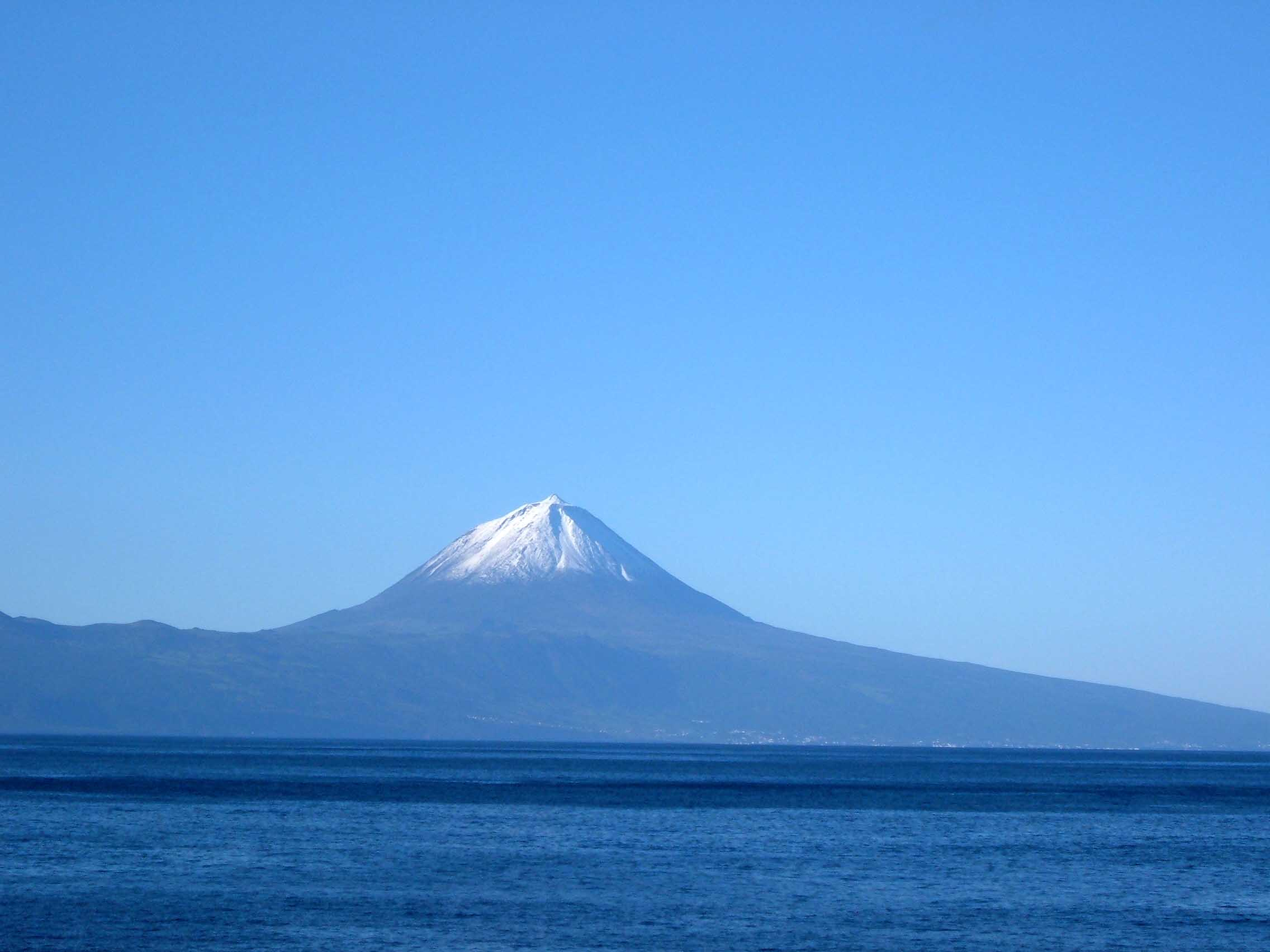 Ilha do Pico vista da Fajã Grande, Calheta, ilha de São Jorge, Açores, Portugal